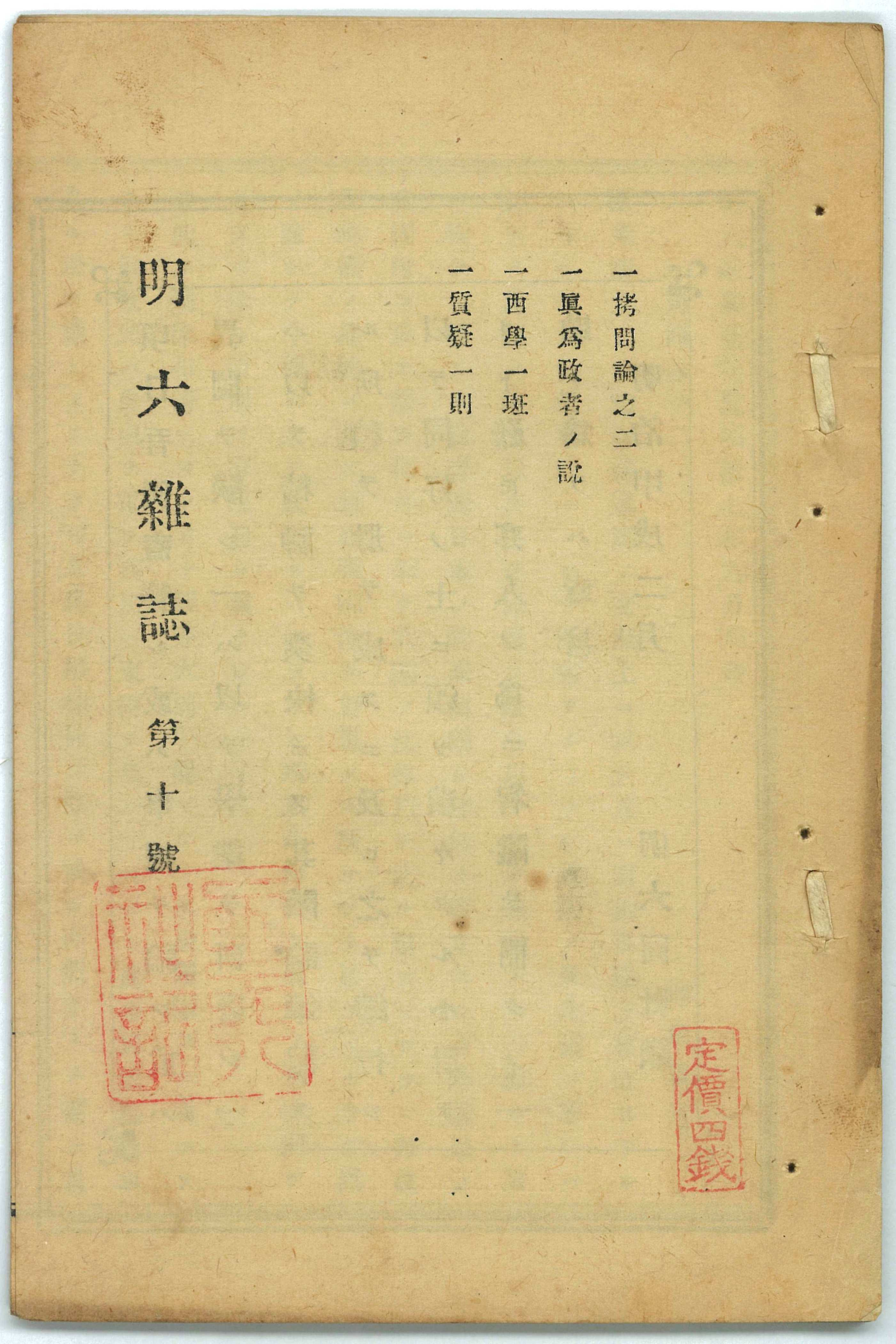 明六雑誌 第十号 1874年（明治7年）6月 明六社発行 ＜表紙＞